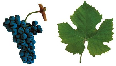 Traube und Blatt der Rotweinsorte 'Touriga_Nacional'